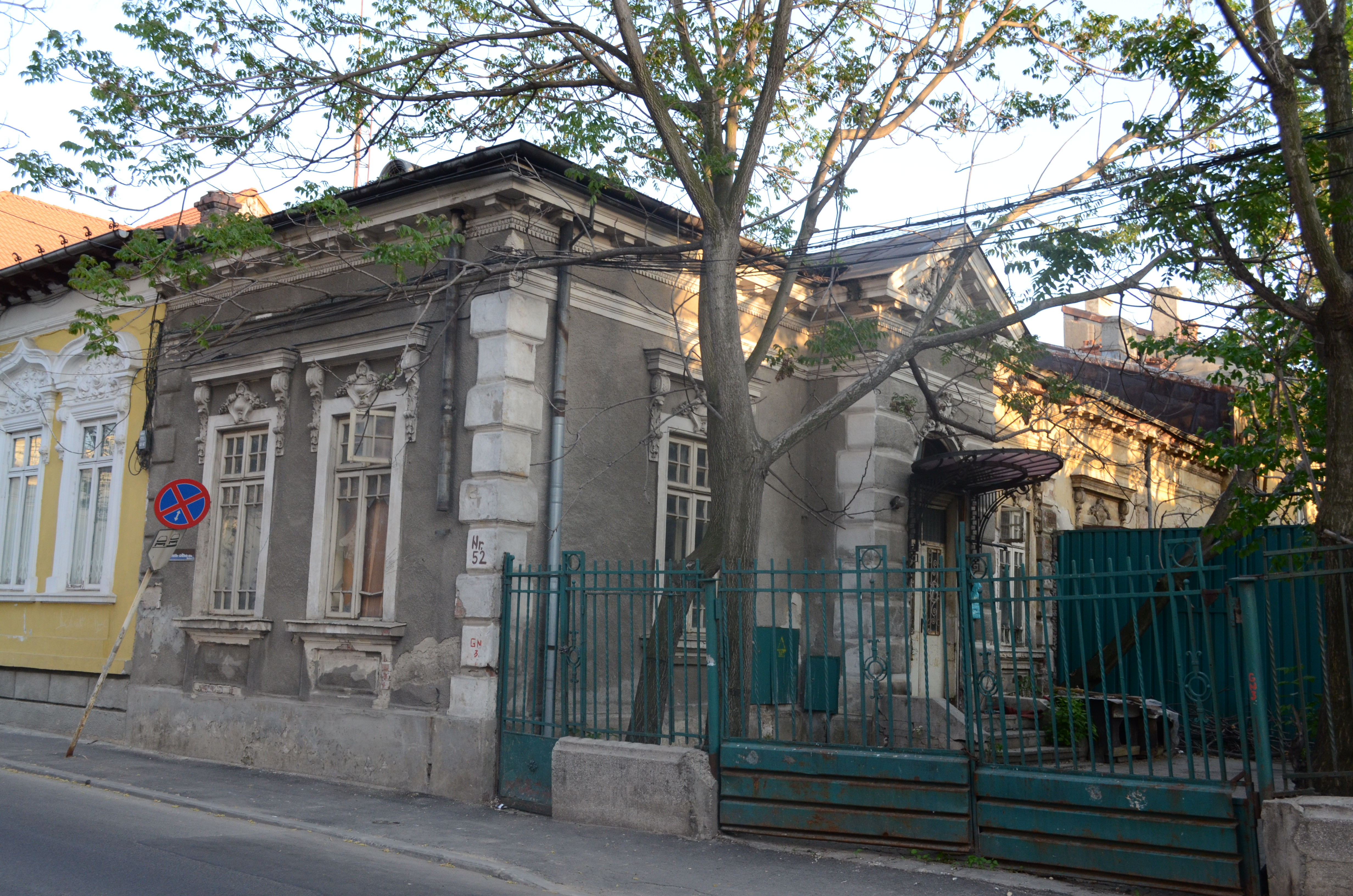 Casă, Strada Matei Basarab nr. 52, Sector 3, București